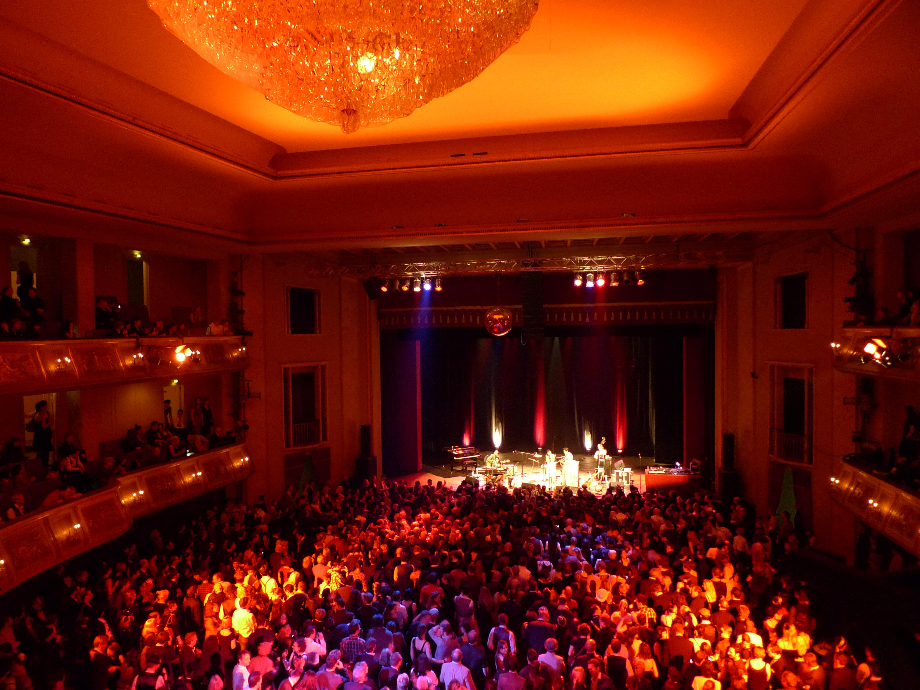 Kitty, Daisy & Lewis in Admiralspalast, Berlin, Sylvester 2009